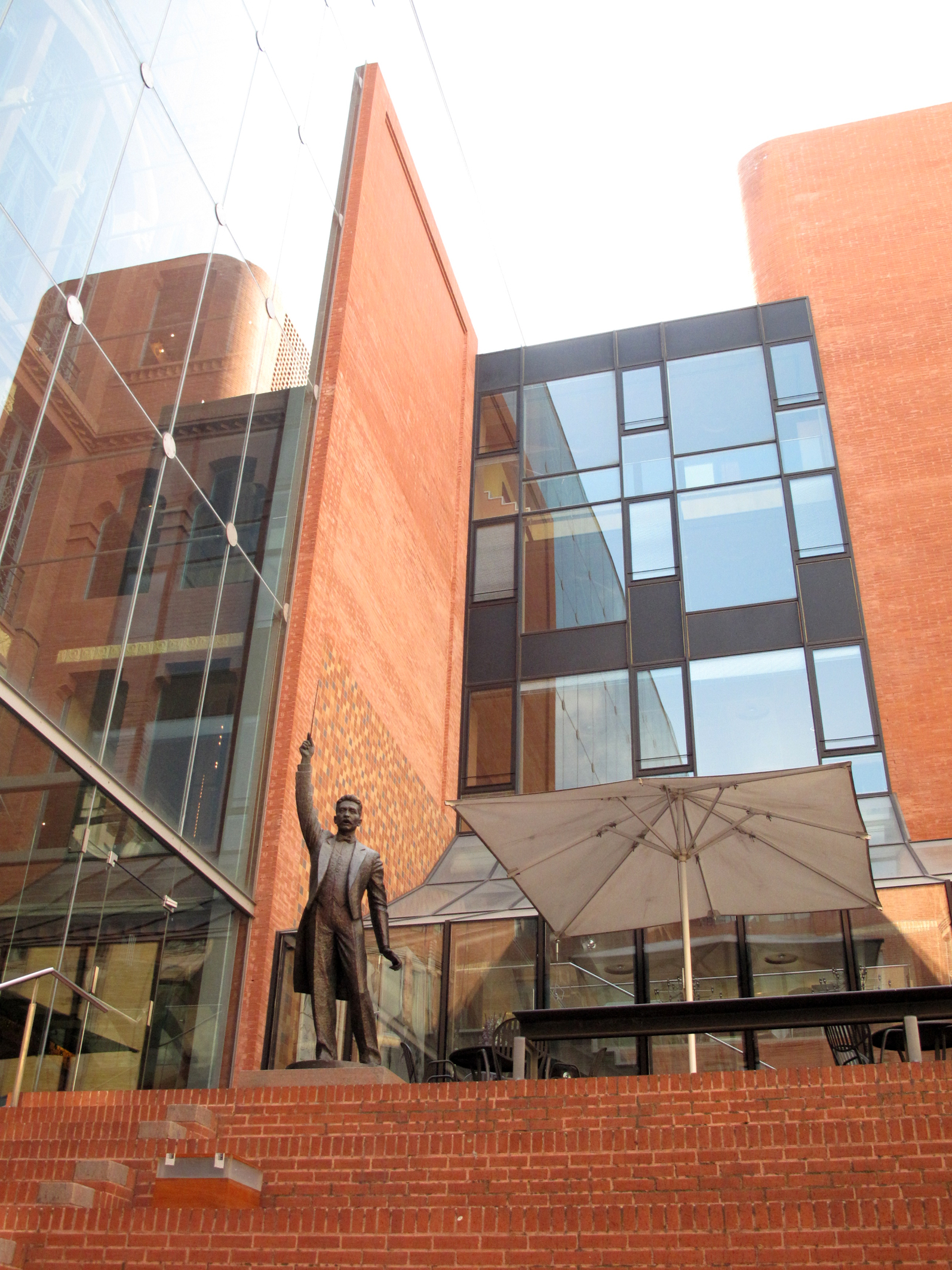 Palau de la Música Catalana (Barcelona)